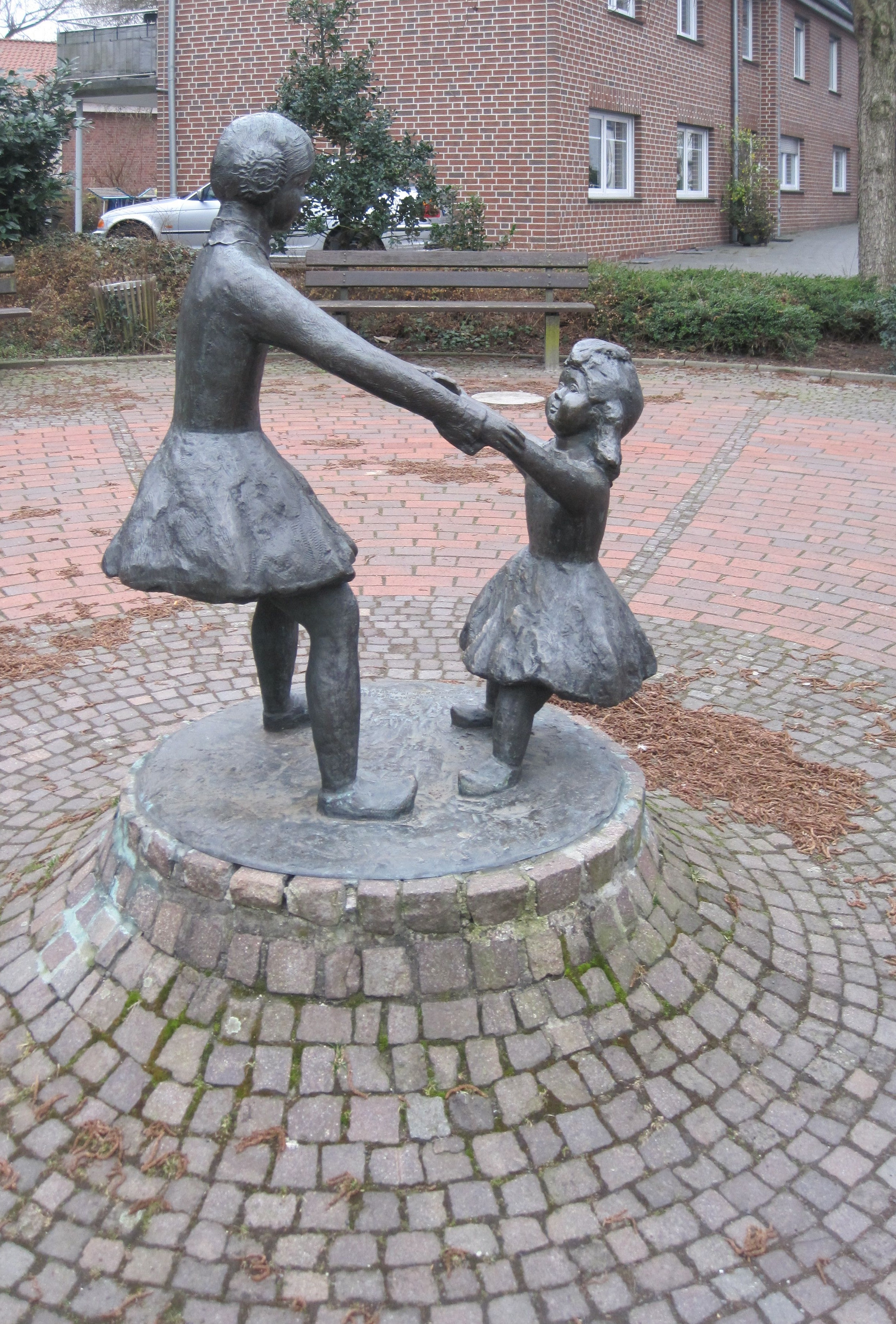 Das Foto zeigt eine Skulptur vor der Pankratiuskirche in Hamm-Bockum-Hövel.